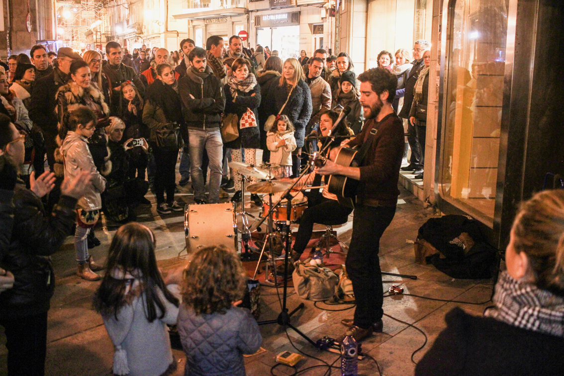 El grupo Escuchando Elefantes en una de sus actuaciones en la calle.